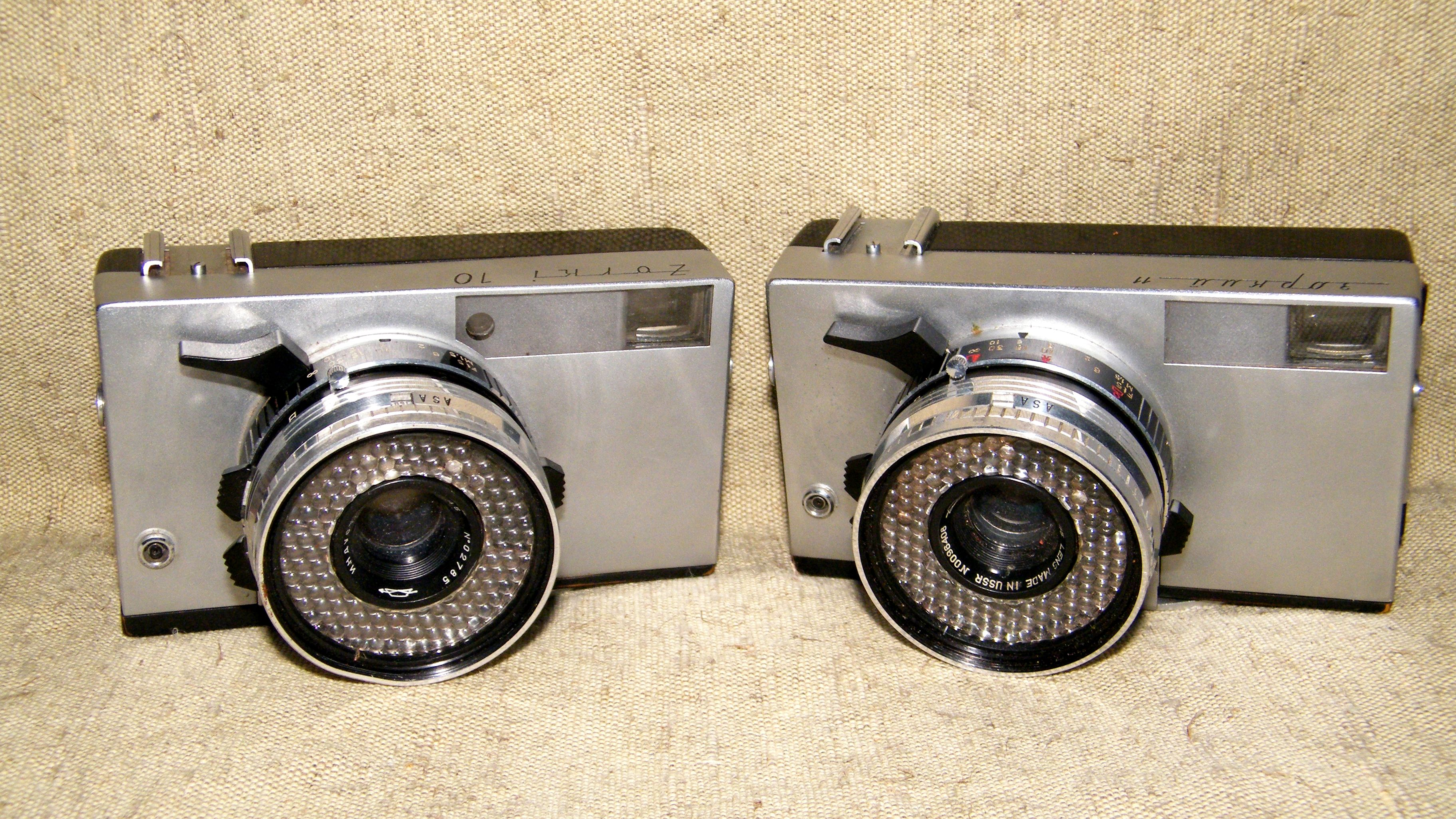 Зоркий-10 и Зоркий-11